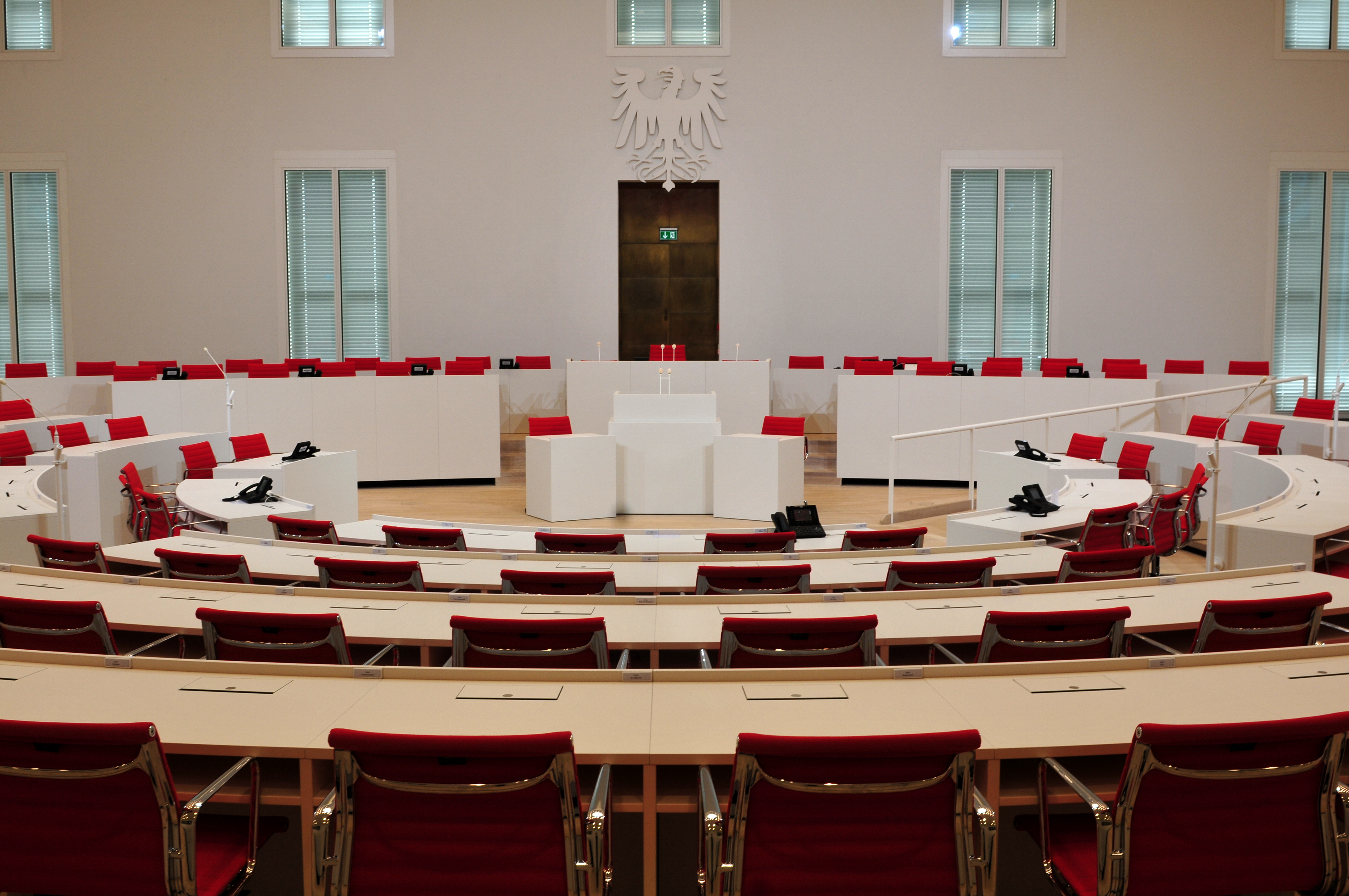 Landtag Brandenburg in Potsdam